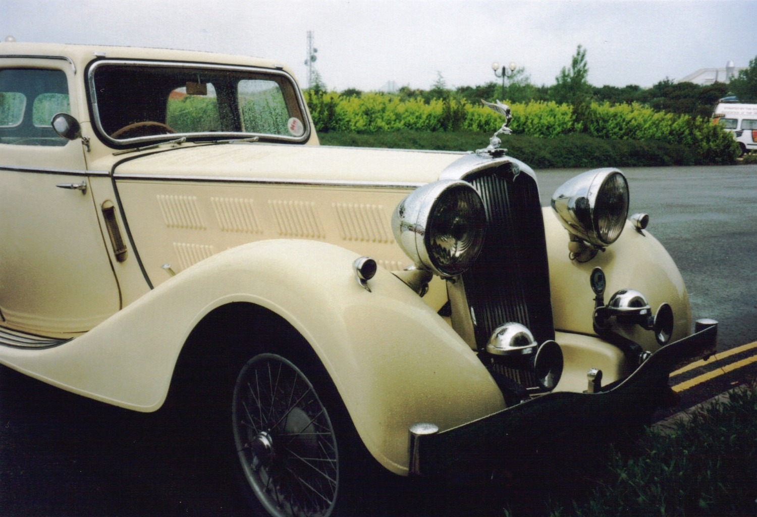 Triumph Vitesse 6-Zylinder, 1936. Foto in England